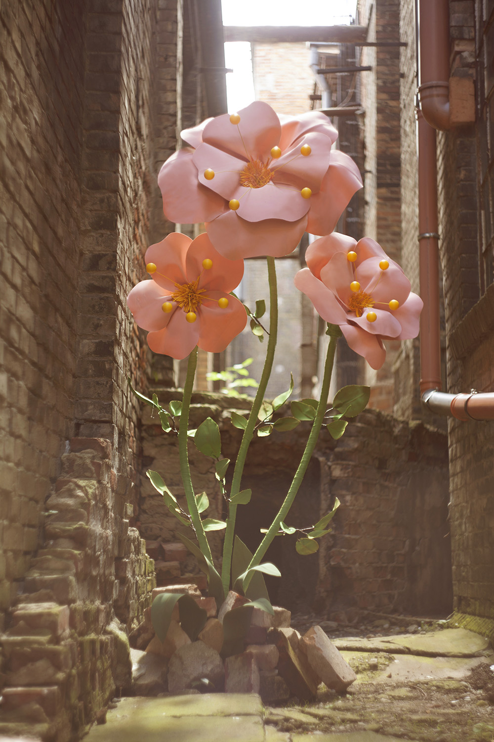 Kwiaty Mirelli von Chrupek, Niefestiwal Miasto i Sztuka